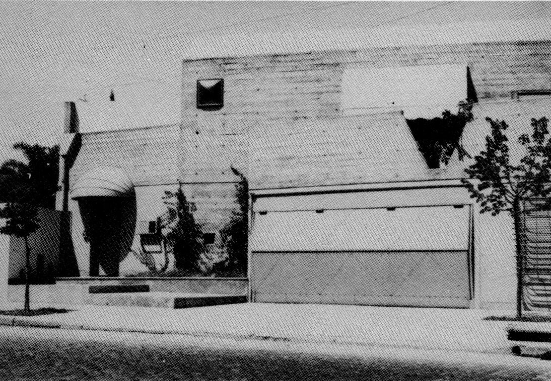 Fachada de la casa de Guido di Tella en Arribeños 1308, Buenos Aires. Diseñada por el arquitecto Clorindo Testa en 1968, fue demolida en 2011.